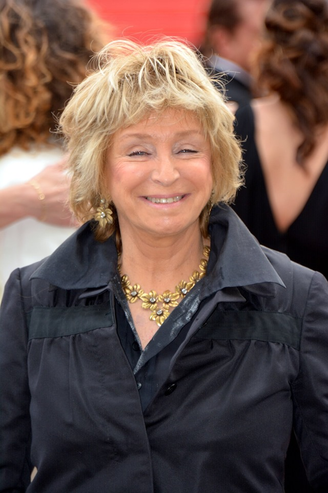 Danièle Thompson au Festival de Cannes 2019.